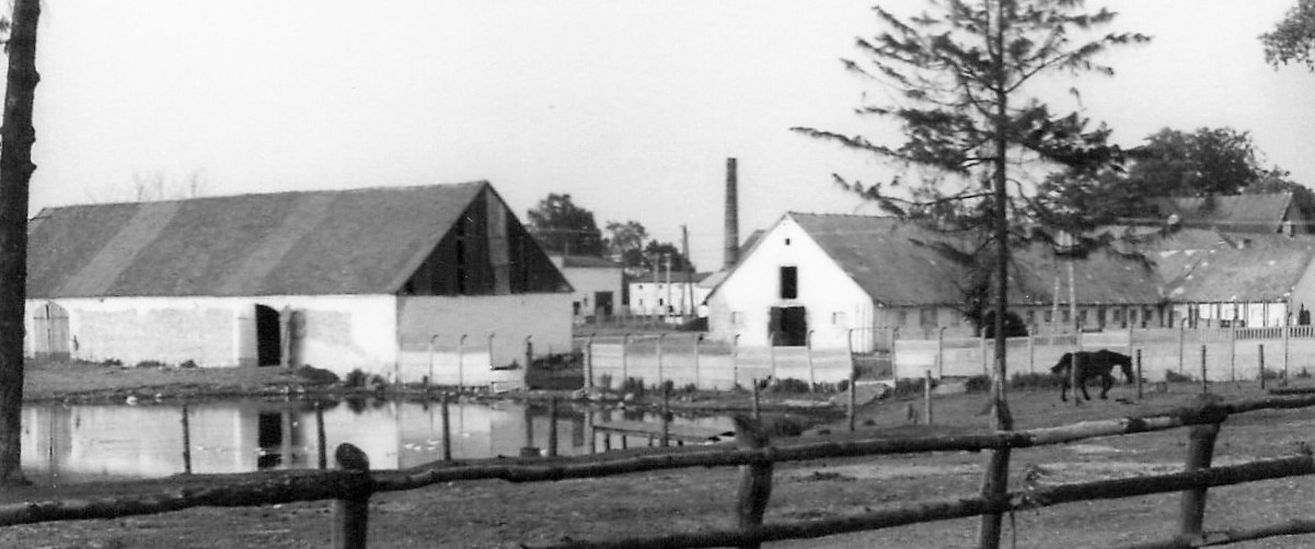 Rudka (Gutshof Hütte), 1971